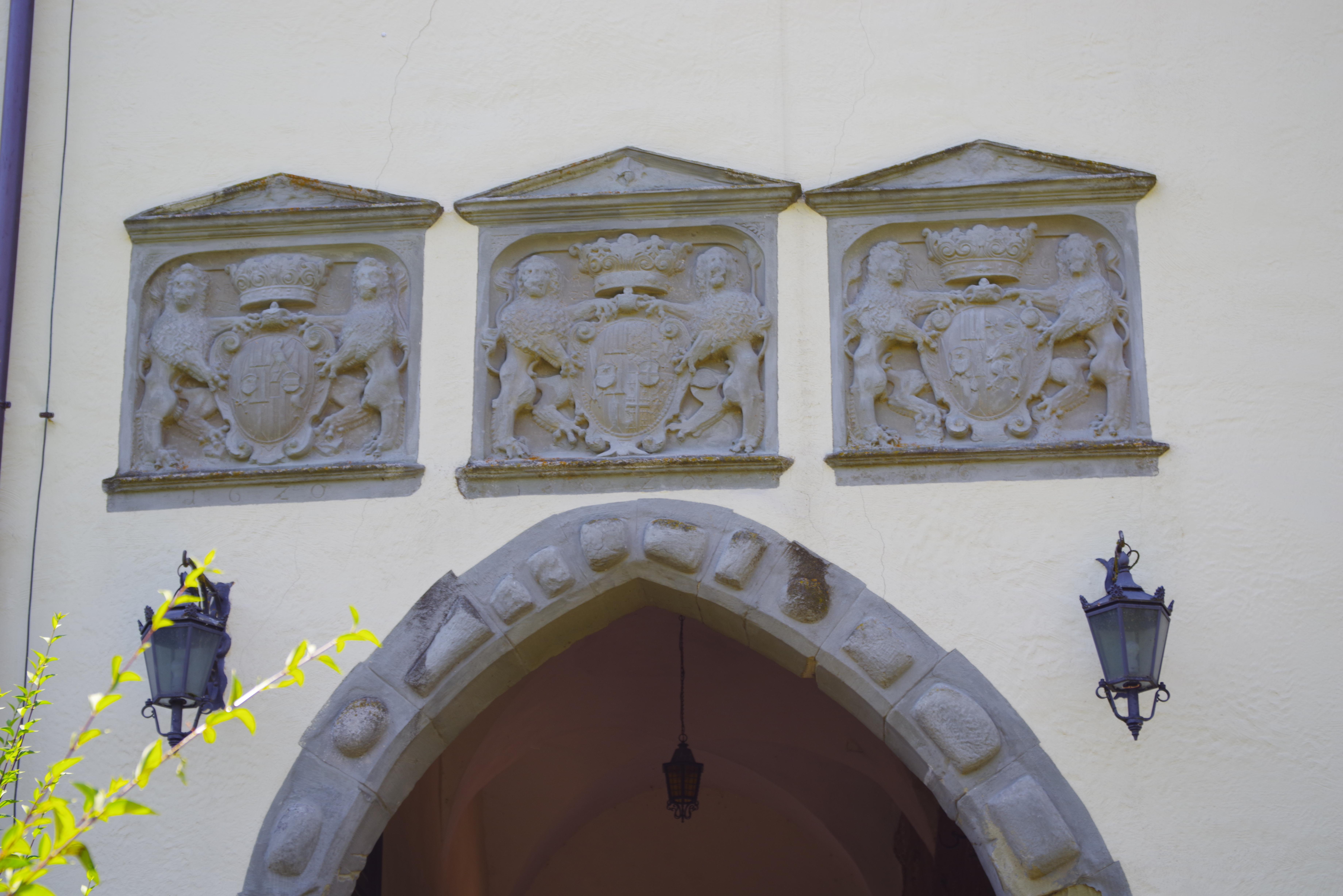 Wappentafeln der Erbauer von Schloss Hohenlupfen